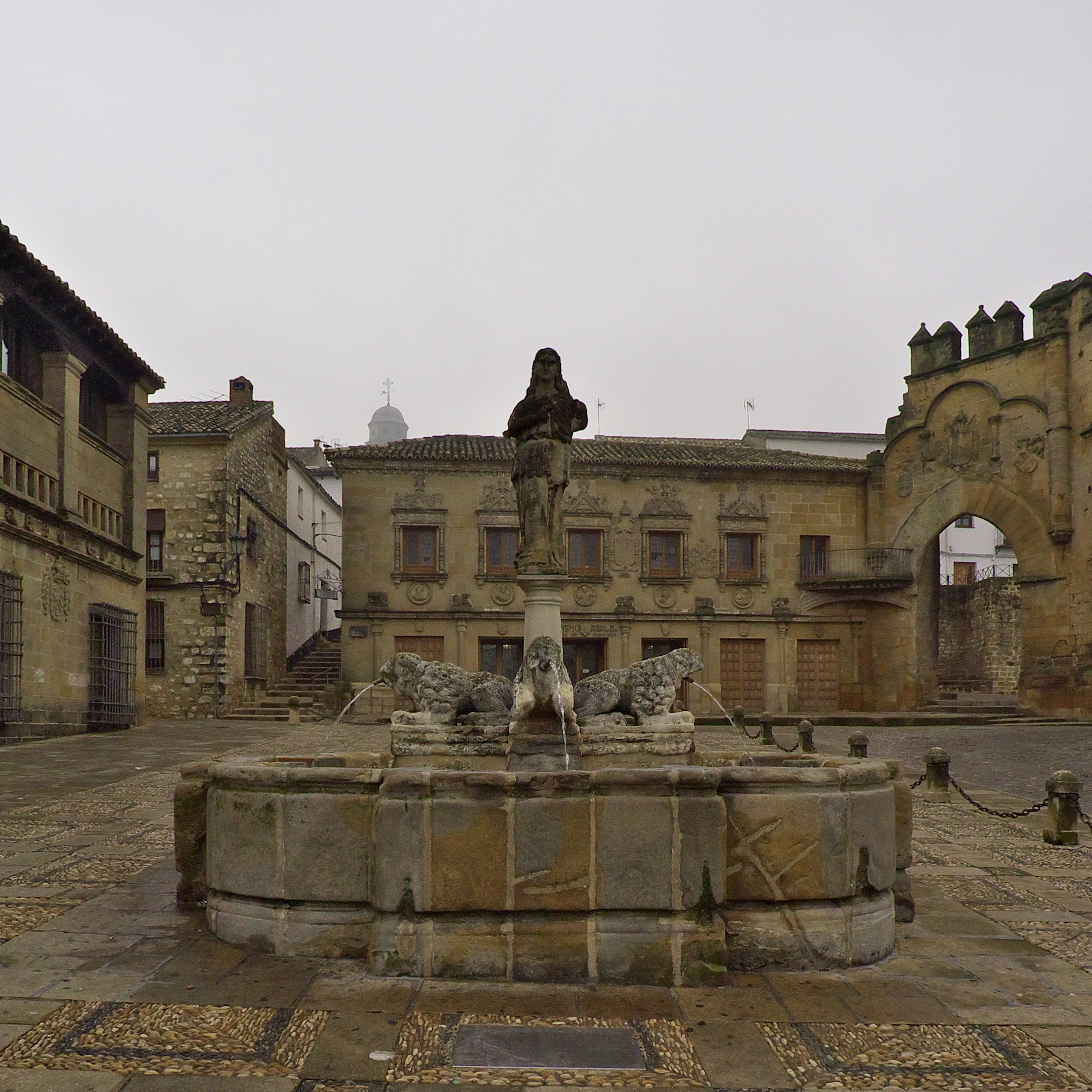 Himilce (o Imilce), princesa de Cástulo, hija de Mucro de Cástulo y esposa de Aníbal, situada en la Fuente de los Leones (Baeza) en el siglo XVI.